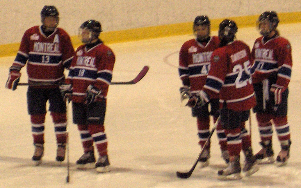 correction du cadrage de ma première photo